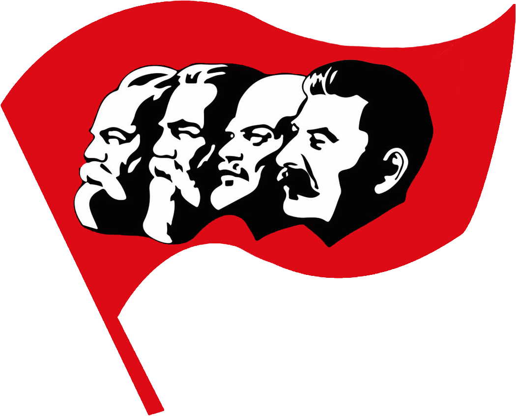 Representación de Marx, Engels, Lenin y Stalin